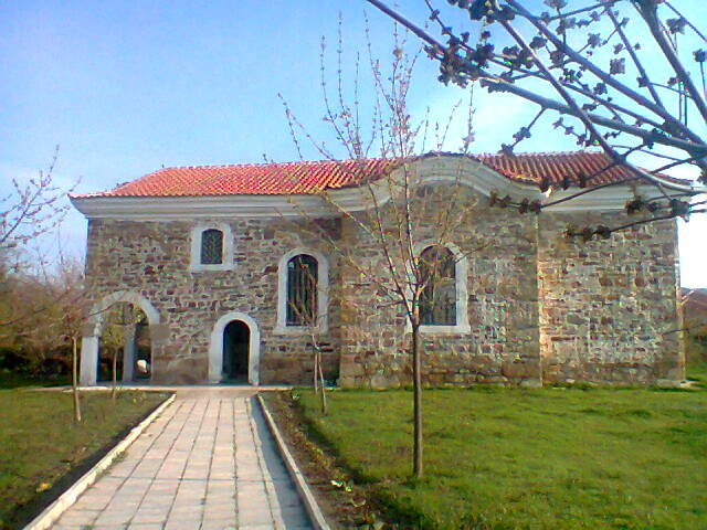 Храмът отвън